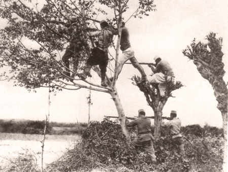 Lufta e Shkodrës